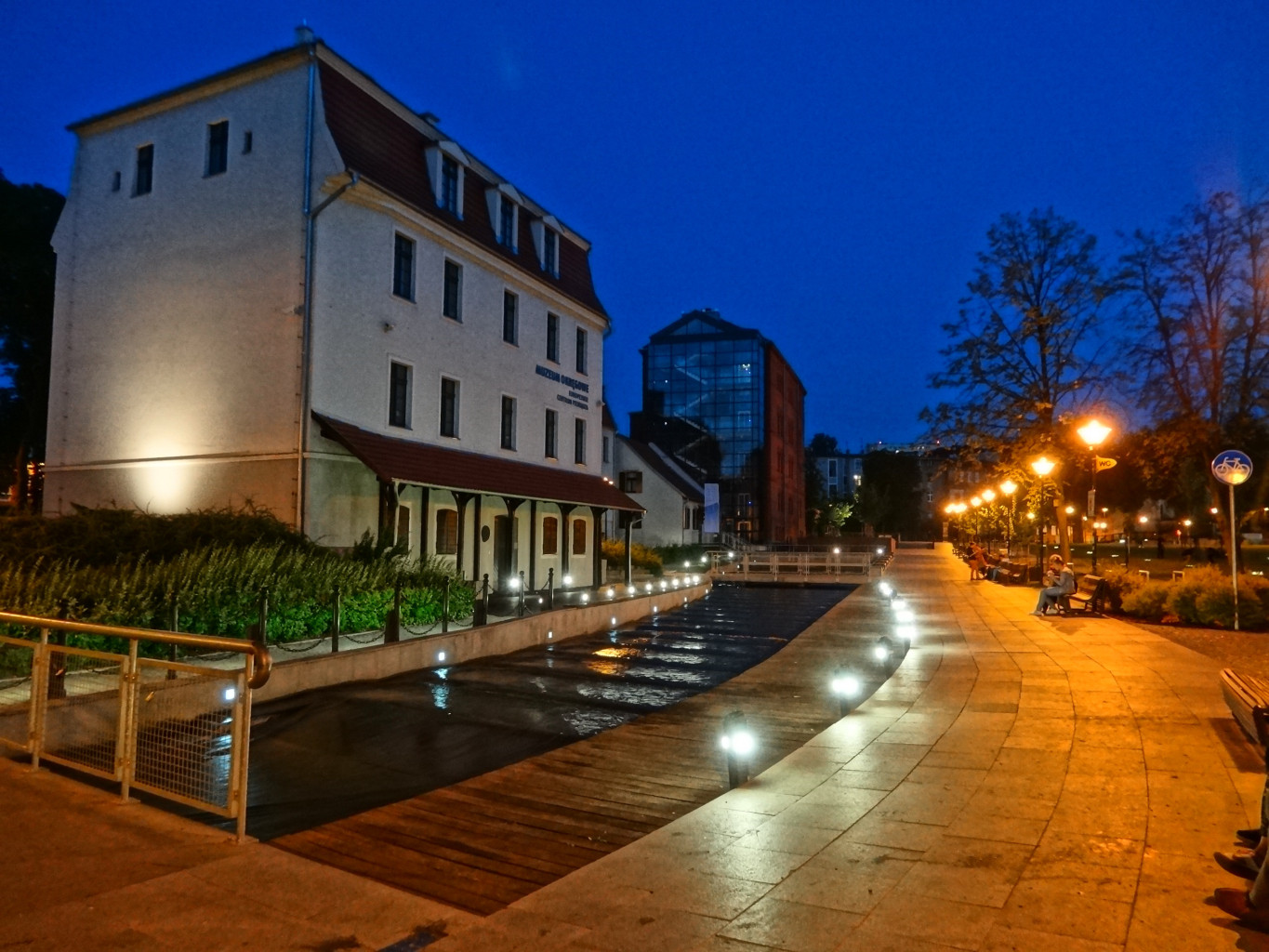 Kaskada Międzywodzie na Wyspie Młyńskiej w Bydgoszczy, odtworzona w 2007 roku